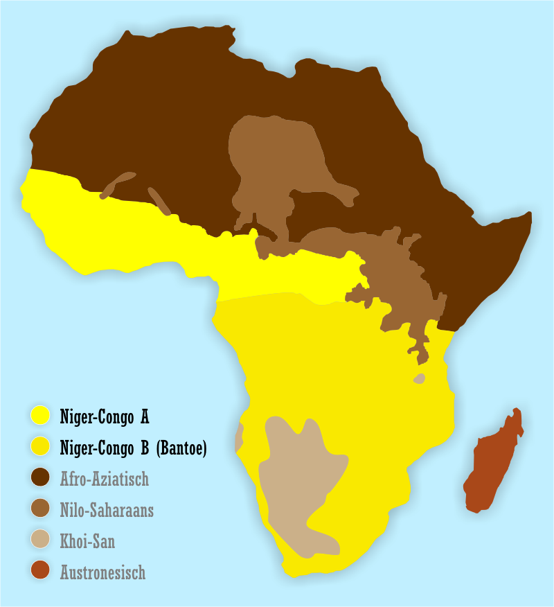 Kaart die een indruk geeft van de verspreiding van de Niger-Congotalen.